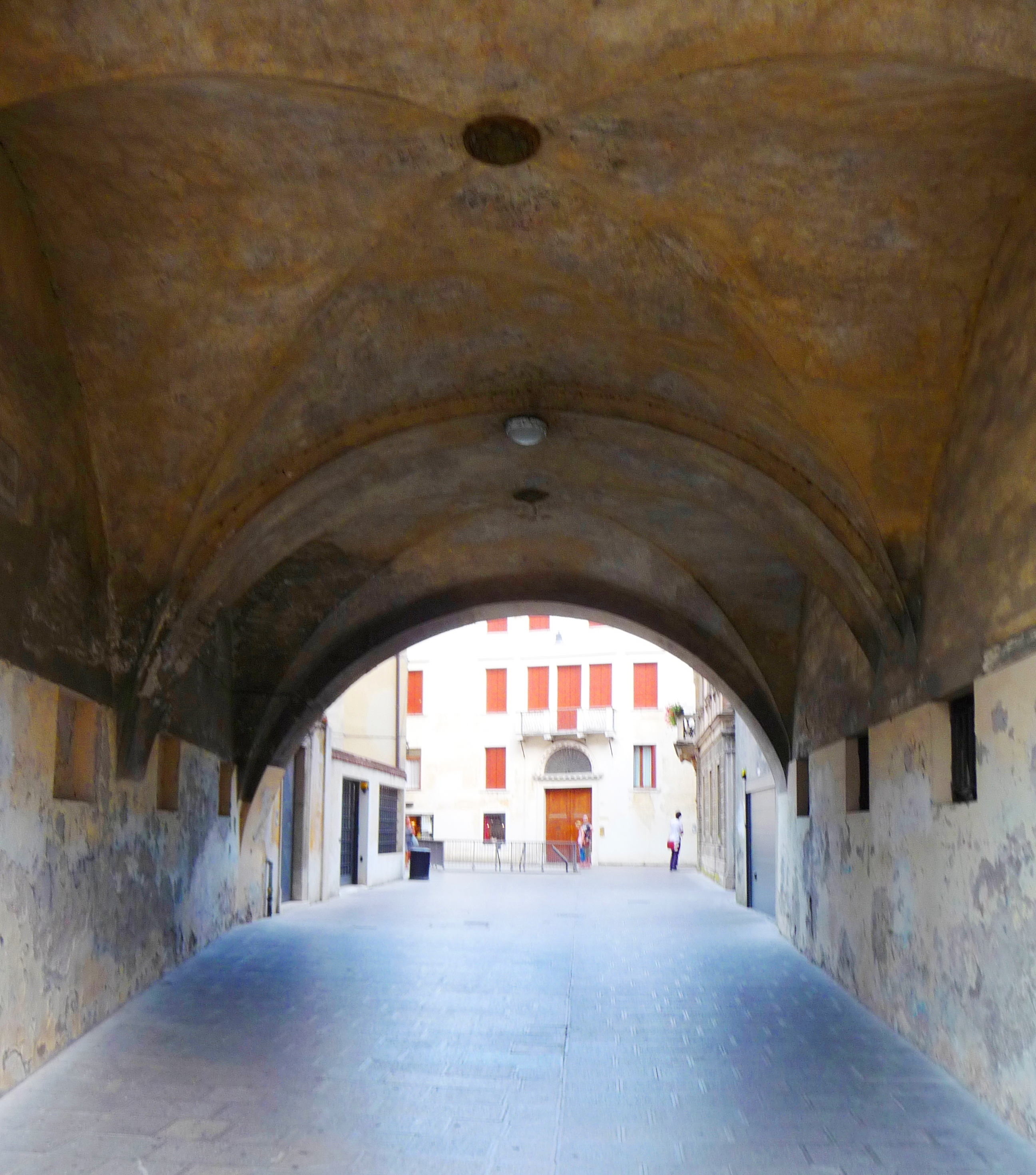 Dort wo die zwei Gebäude zusammenstoßen, öffnet sich der "portego del vescovo" (~Bischofspassage), mit einem kreuzgewölbten Gang, der zum Kanoniker Weg führt. Der Durchgang ist seit dem Ende des 4. Jahrhunderts belegt, ist aber wahrscheinlich älter. Sein heutiges Aussehen entstammt Bauarbeiten aus dem 5. Jahrhundert. An den beiden Schlusssteinen der Keuzgewölbe zwei Wappen des Bischofs Ermolao Barbaro.